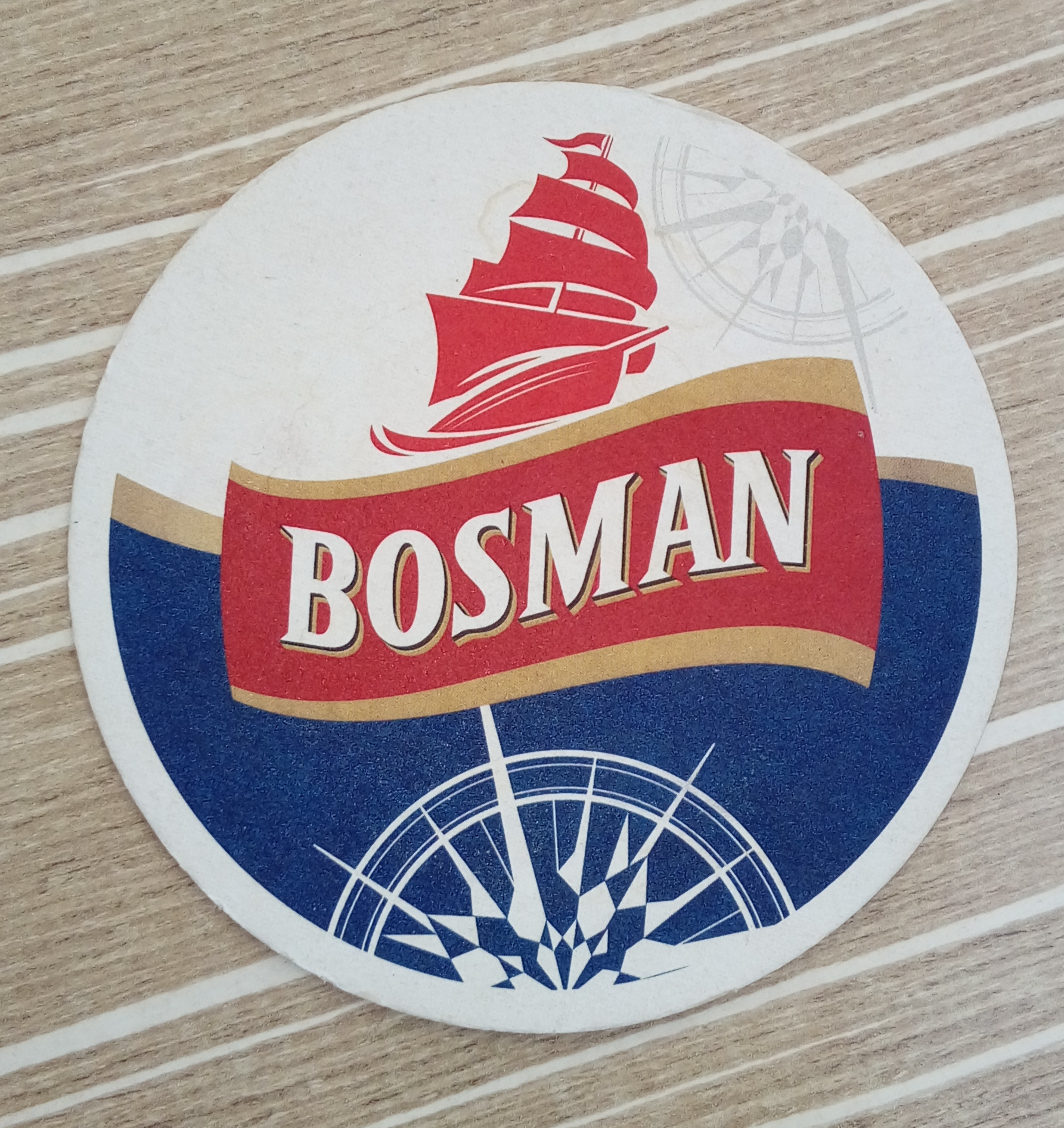 Podstawka pod piwo Bosman